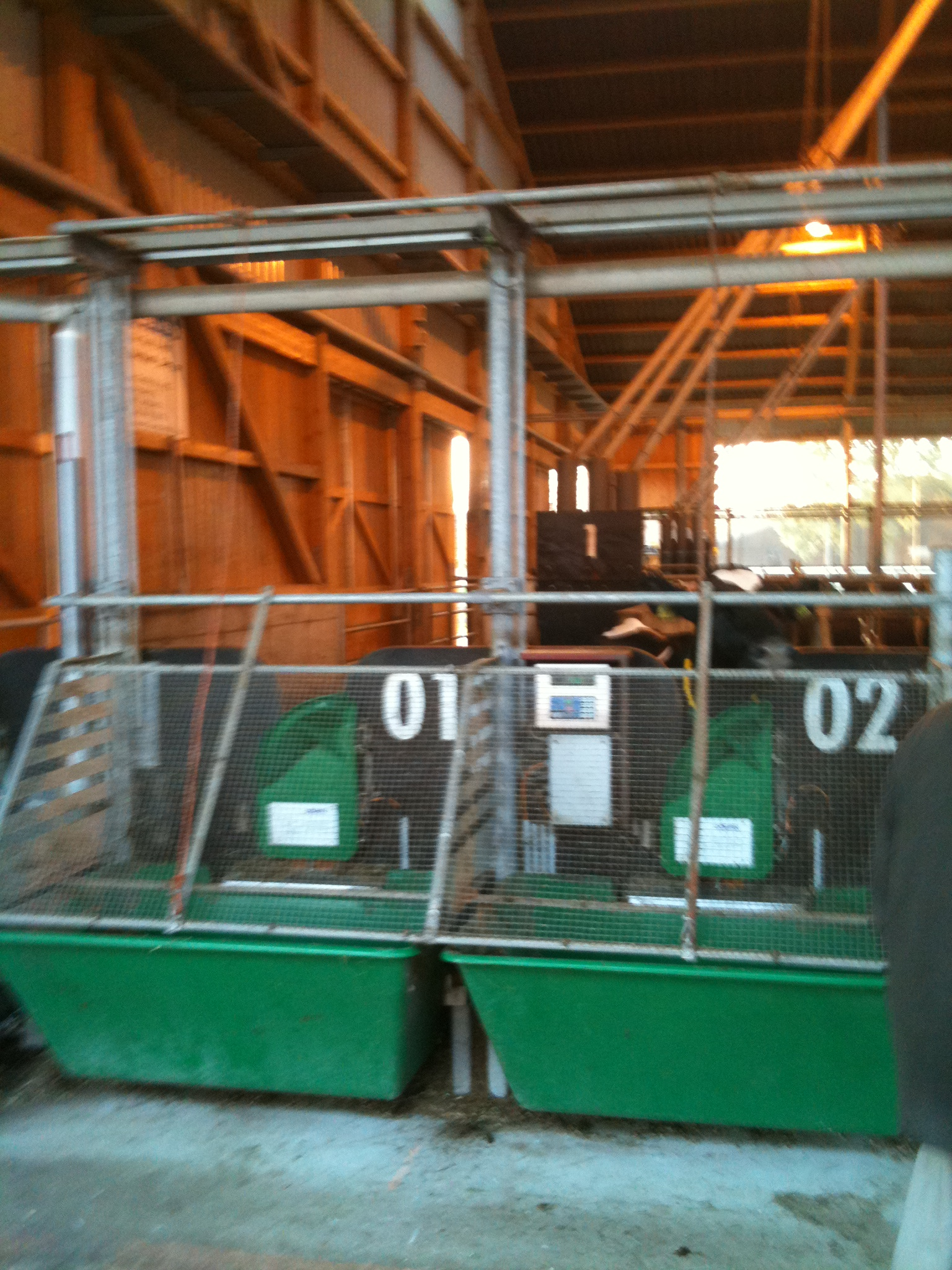 Kuhstall auf Haus Riswick Baujahr 2010/2011 mit Futterträgen die mit Transpondern und Waagen arbeiten